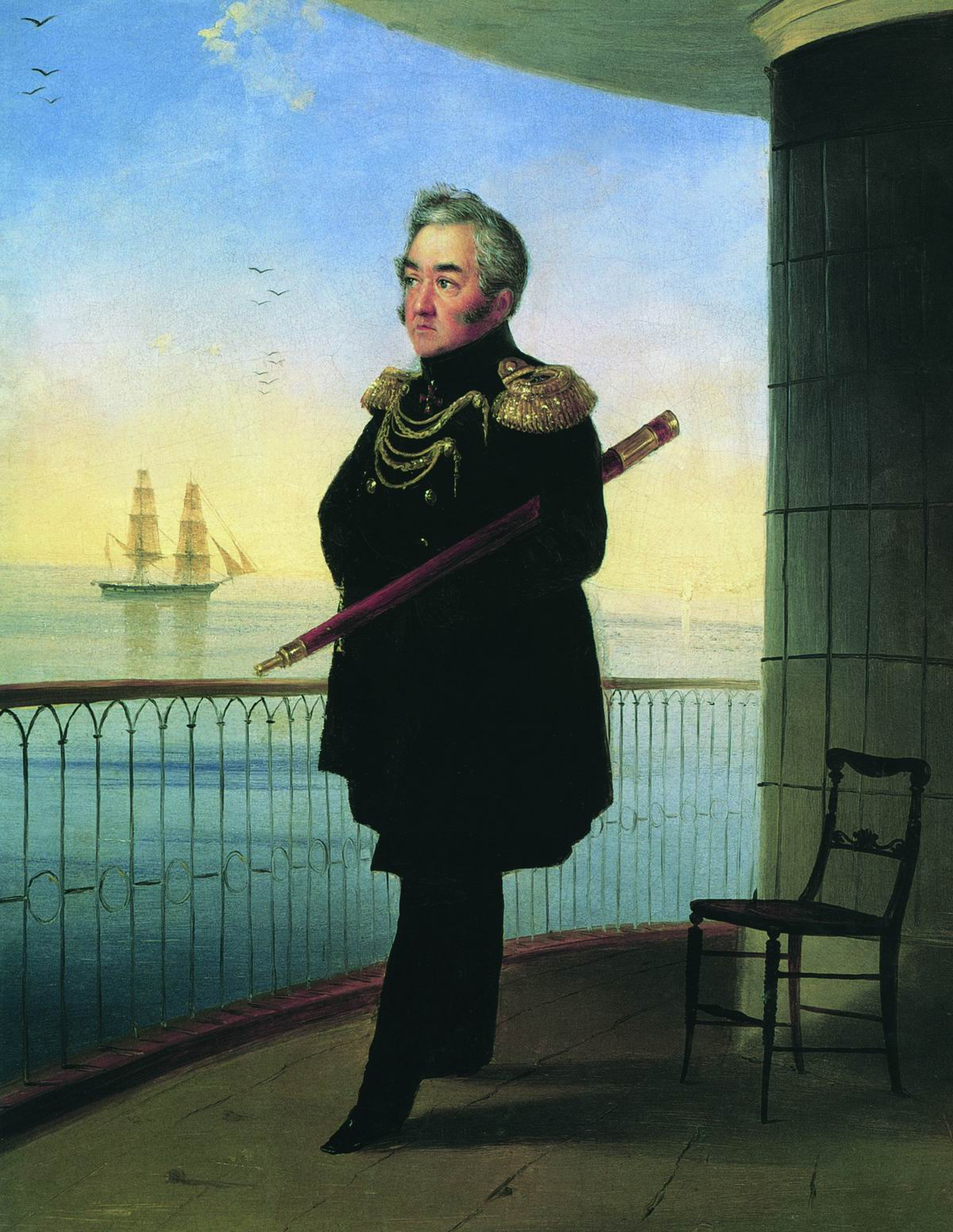 Портрет вице-адмирала М.П. Лазарева.1839 Картон, масло. 47x39 см. Центральный Военно-морской музей, Санкт-Петербург